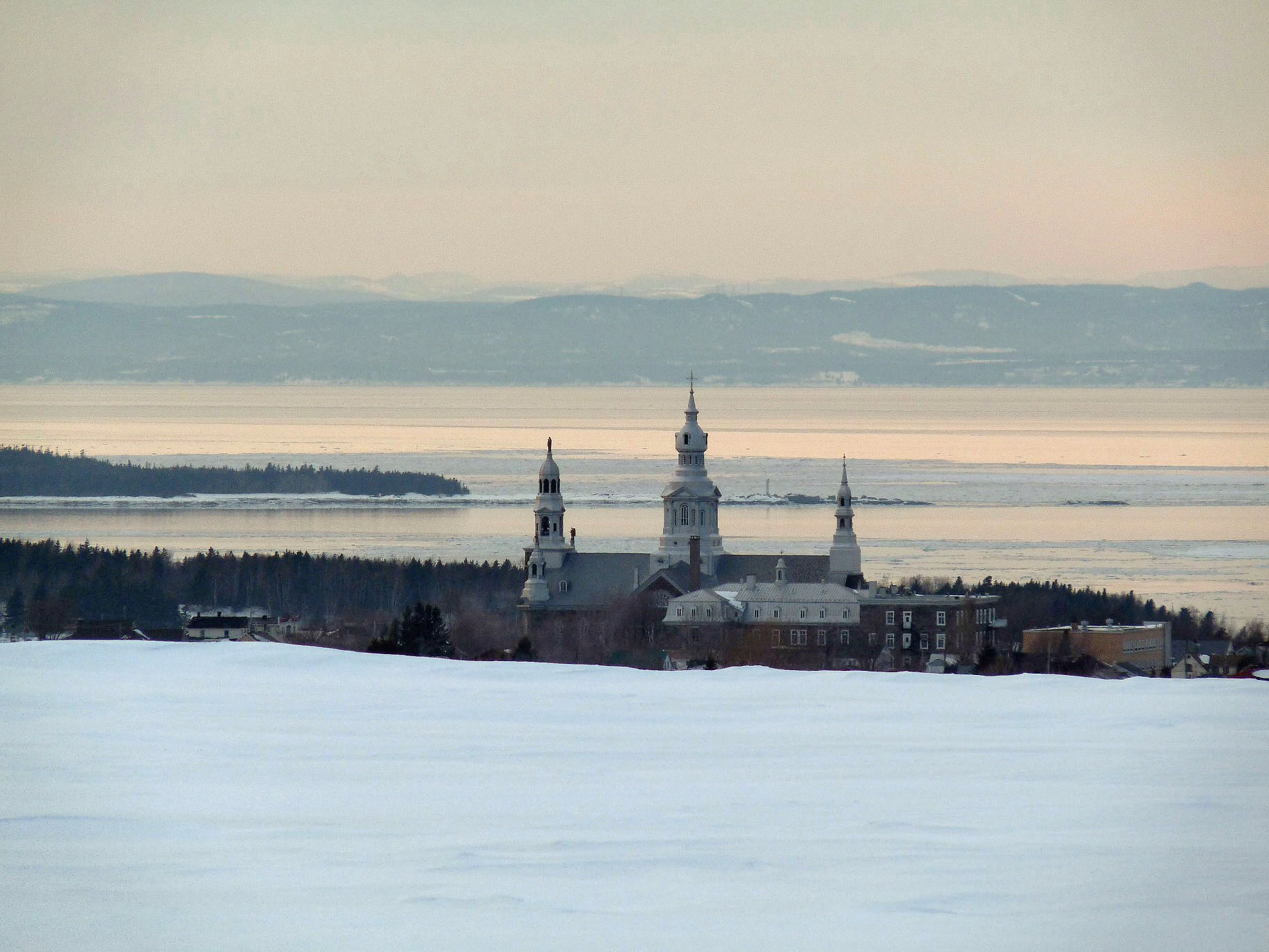 Village de Trois-Pistoles au Bas-Saint-Laurent (Québec) avec le fleuve Saint-Laurent et l'île aux Basques en arrière-plan.